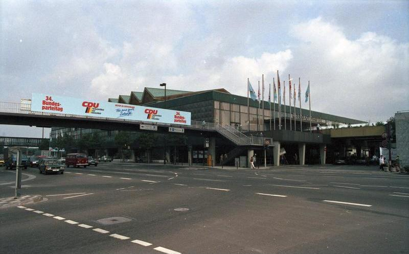 7./8.10.1986 34. Bundesparteitag der CDU in der Rheingoldhalle, Mainz (6.-8.10.1986).